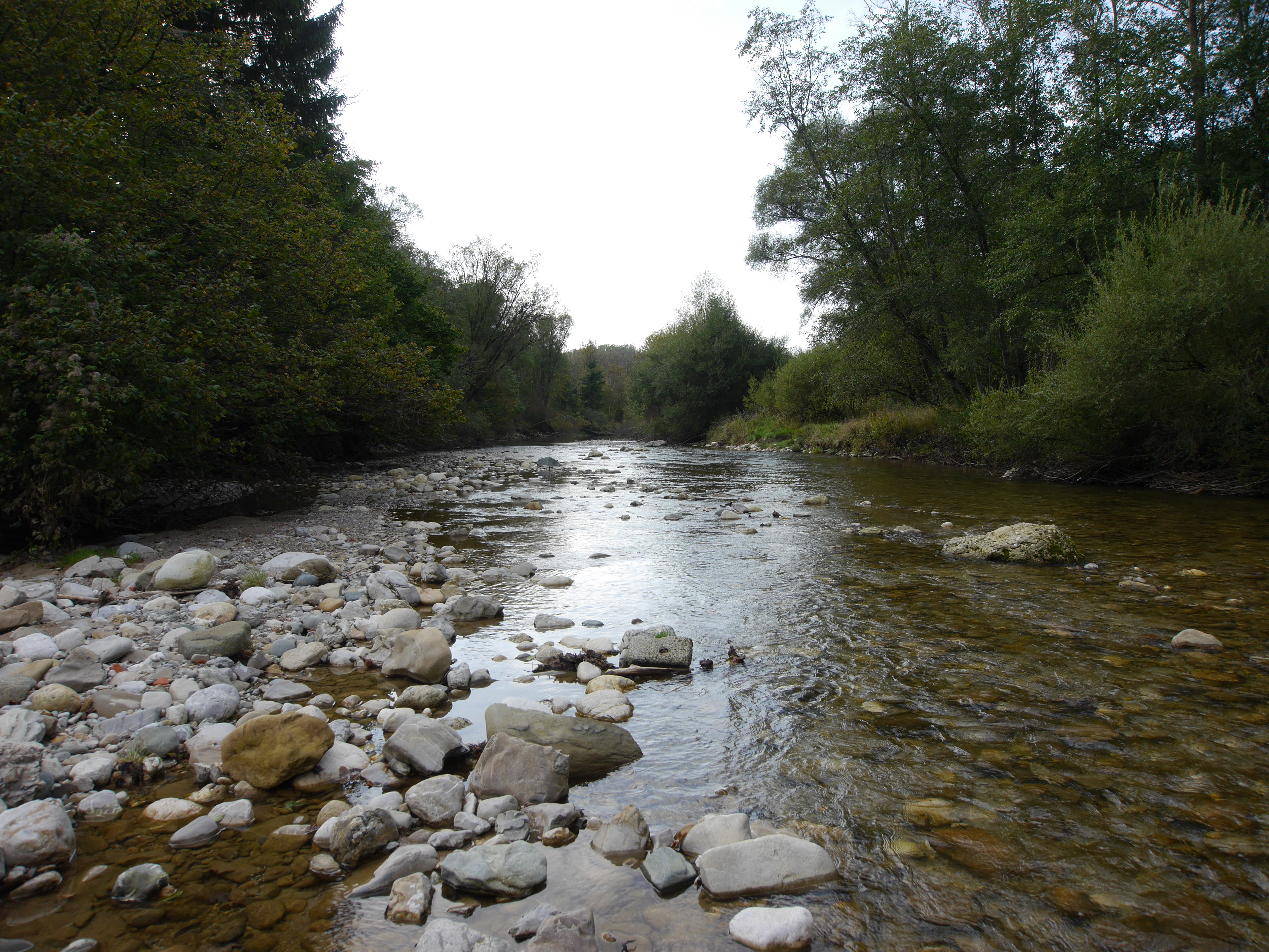 Leitzach nahe Esterndorf, flussabwärts gesehen